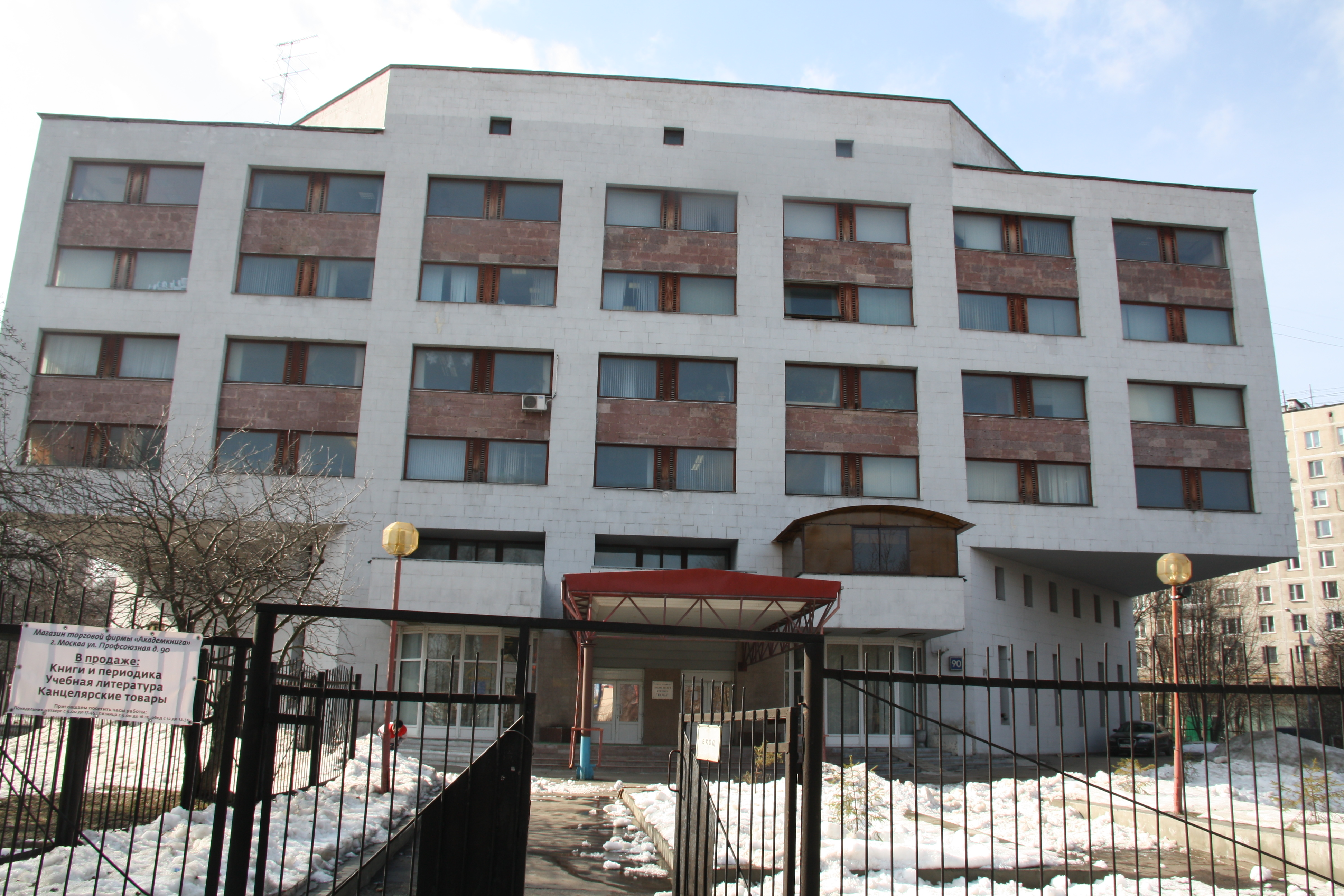 Здание издательства «Наука» в Москве по адресу: ул. Профсоюзная, д. 90.